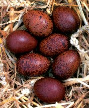 Les oeufs de la poule Marans